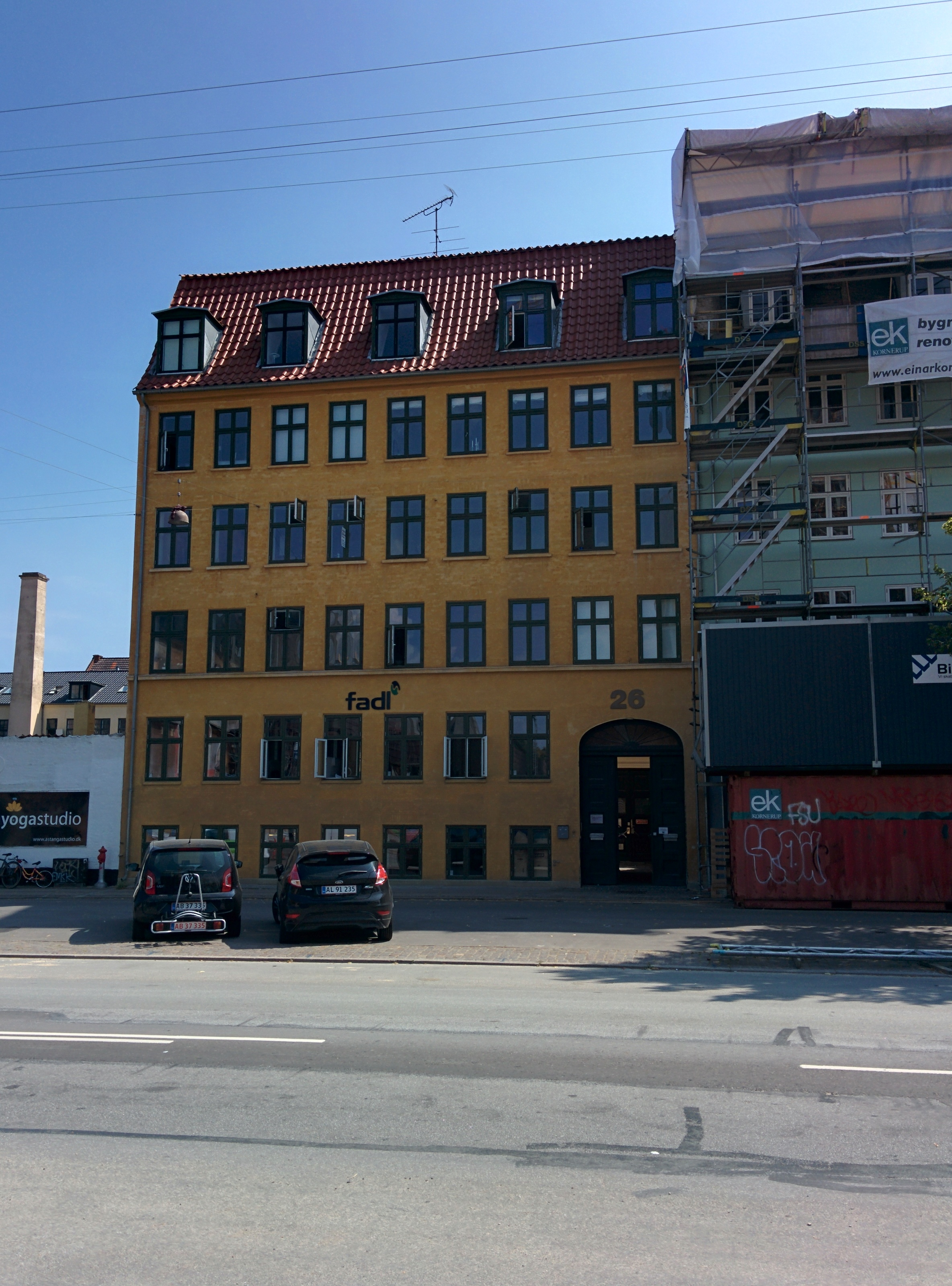 FADL (Foreningen af danske lægestuderende), kontor på Blegdamsvej, København